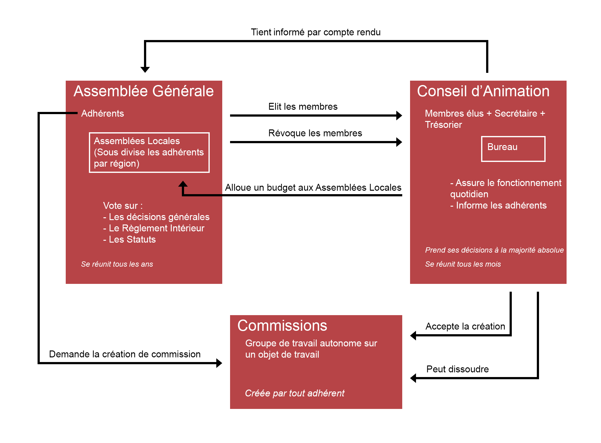 Schéma de l'organisation et du fonctionnement du "Syndicat des Travailleurs et Travailleuses du Jeu Vidéo" selon les statuts du 21 octobre 2018.